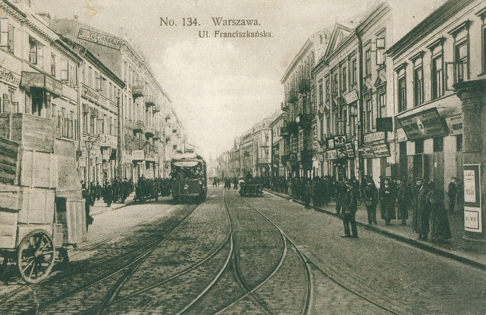 Ulica Franciszkańska przy Nalewkach w Warszawie